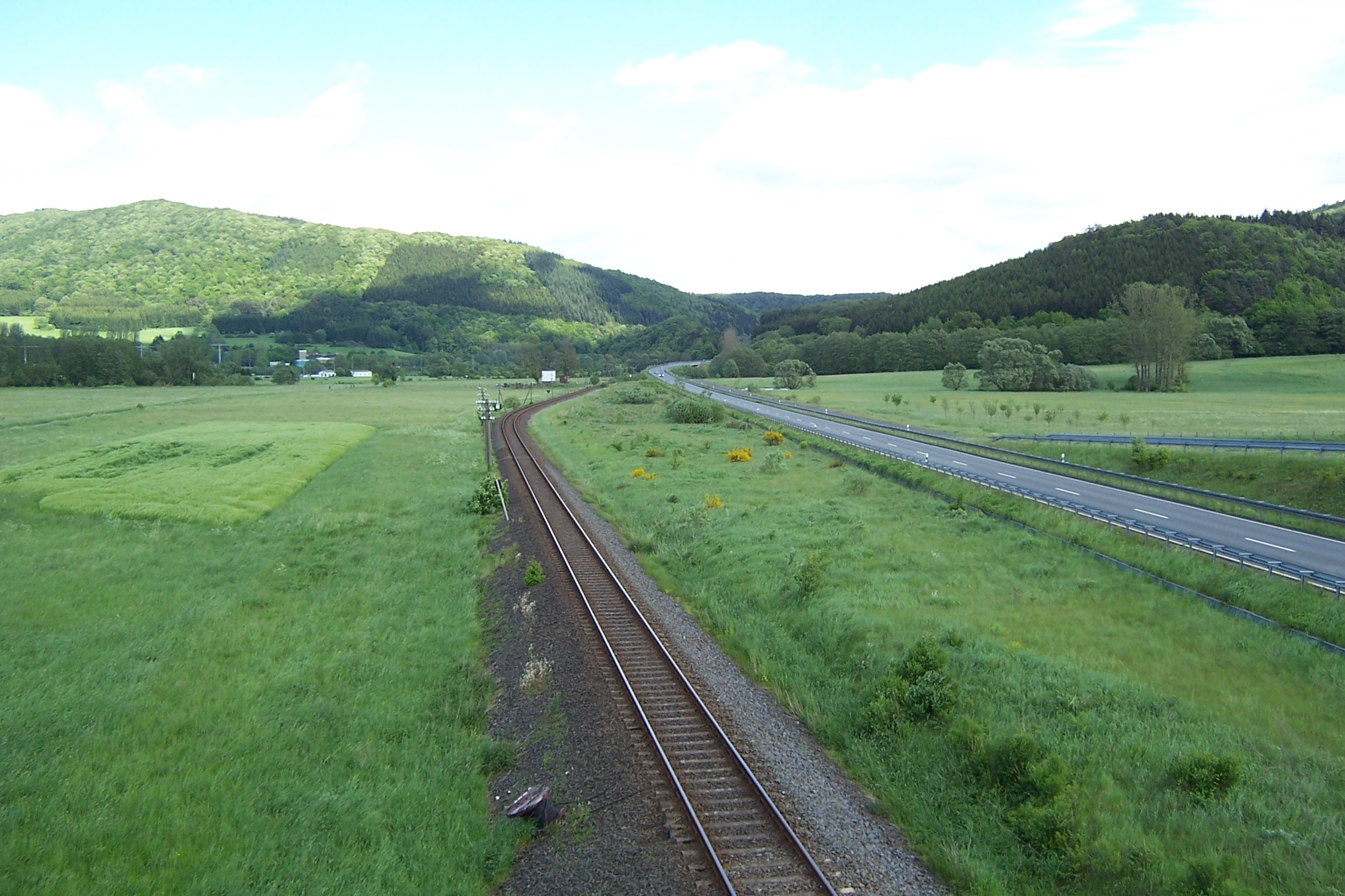 Bahnstrecke Kreuztal–Cölbe und Ortsumfahrung Biedenkopf (kombinierte Bundesstraße 62/Bundesstraße 253) südlich Wallau, Blickrichtung Osten; Kamera-Standort: Brücke über Bahnstrecke und Bundesstraße